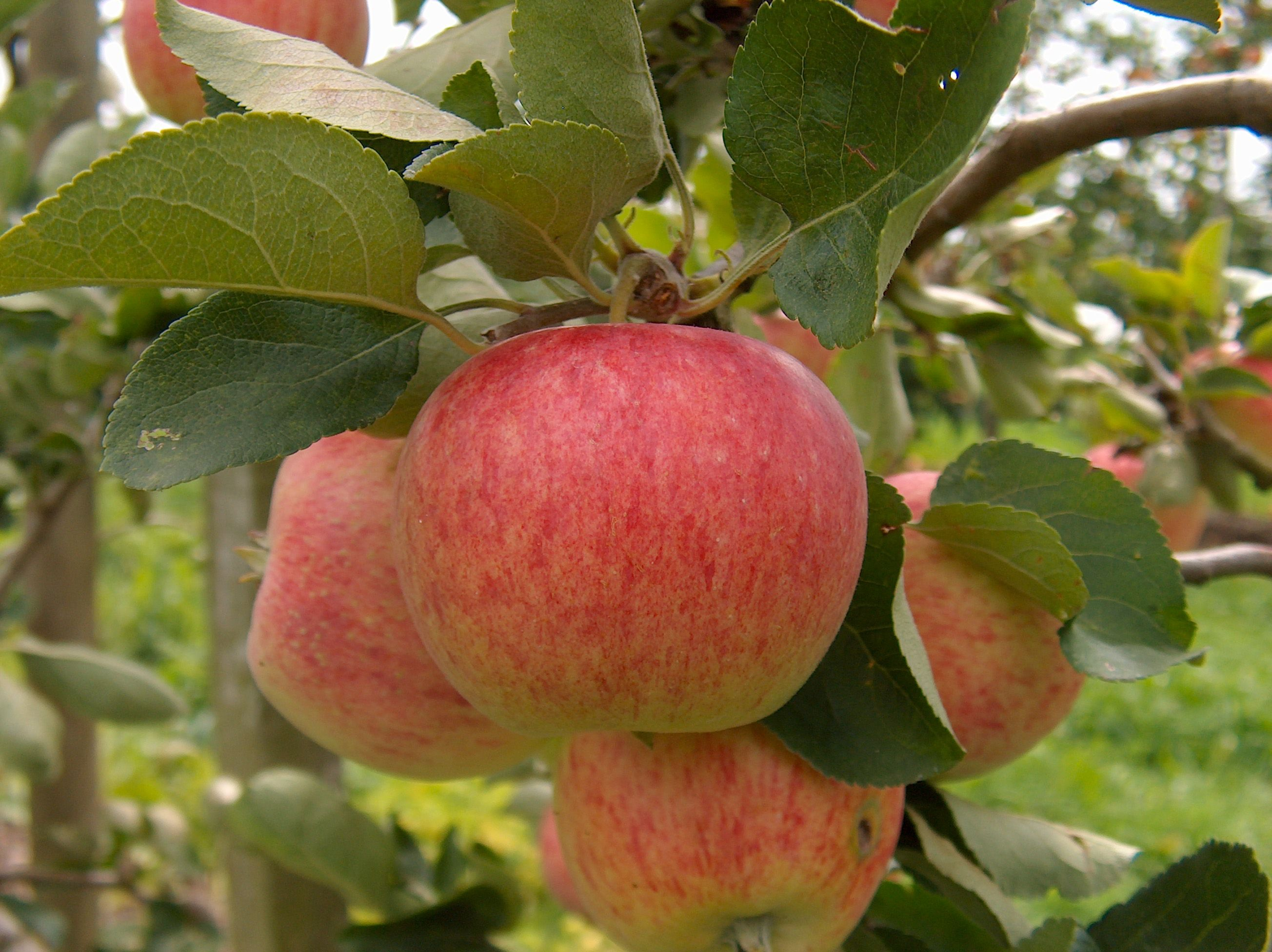 Apfel der Sorte Piros am Baum